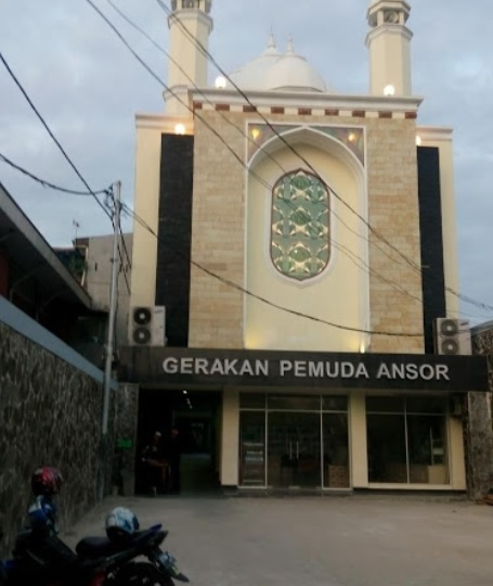 Gedung Gerakan Pemuda Ansor (tingkat bawah) dan Masjid KH Abdurrahman Wahid (tingkat atas). Jl. Kramat Raya No.65 A, RT.1/RW.8, Kramat, Senen, Kota Jakarta Pusat, Daerah Khusus Ibukota Jakarta 10450